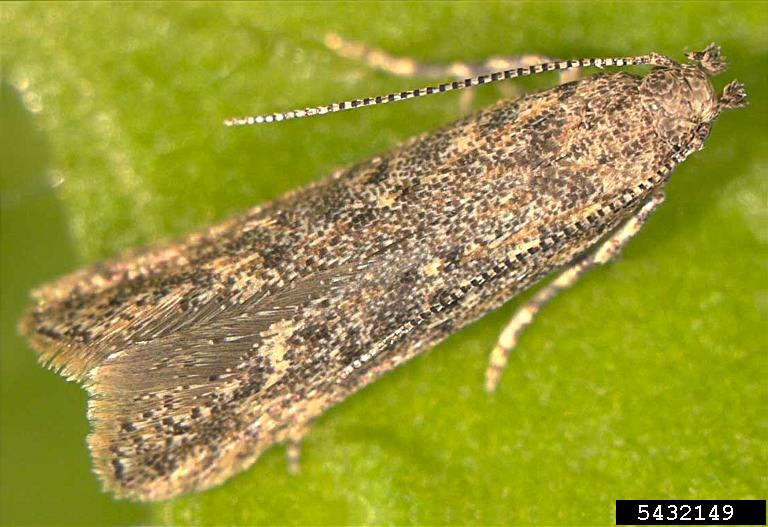 Tuta absoluta, mineuse sud-américaine de la tomate, adulte